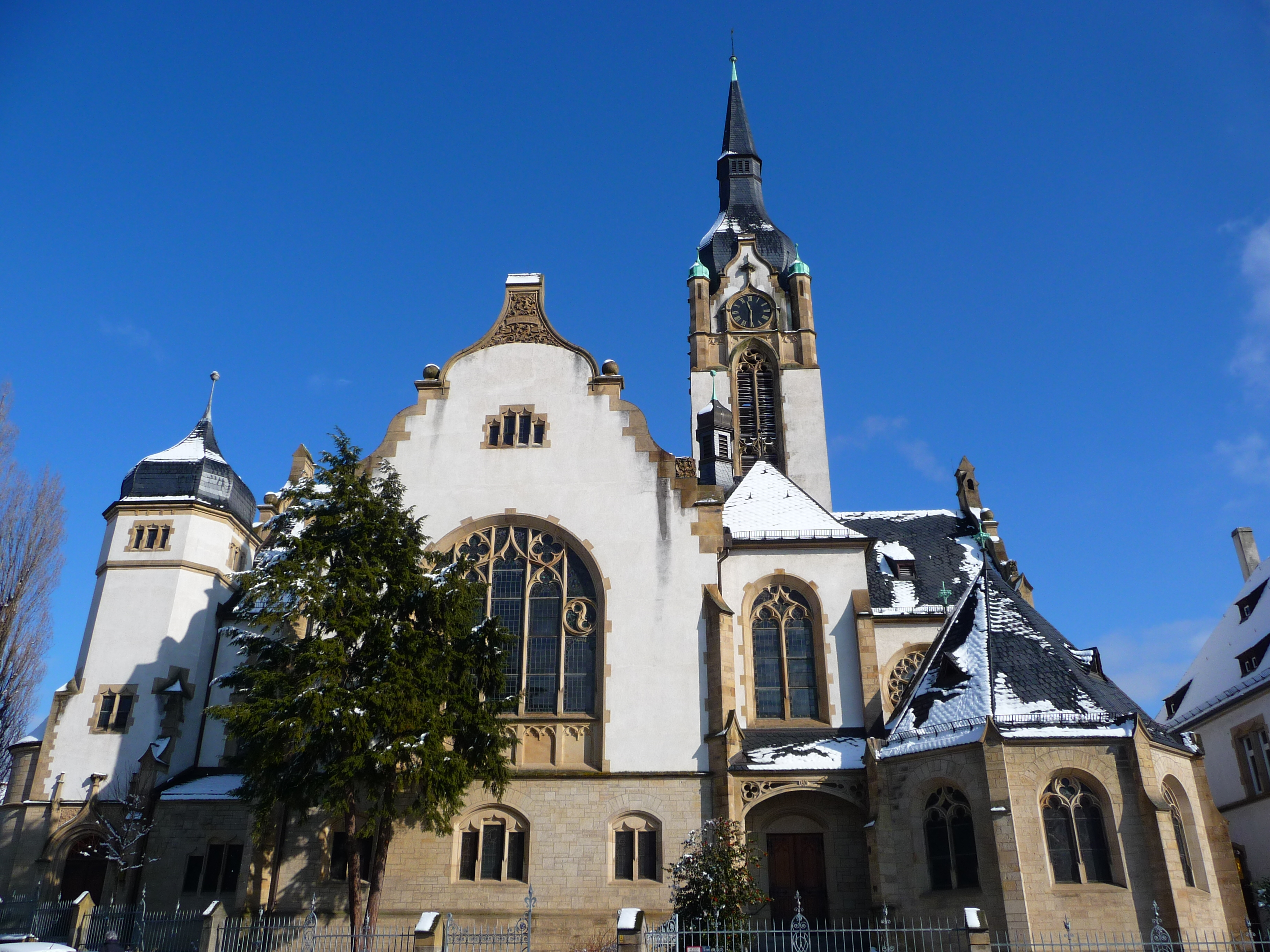 Evangelische Friedenskirche in Heidelberg-Handschuhsheim (Deutschland) - Seitenansicht